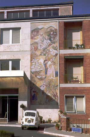 Carlo Ludovico Bompiani - Mosaico a Mondragone (Frascati)